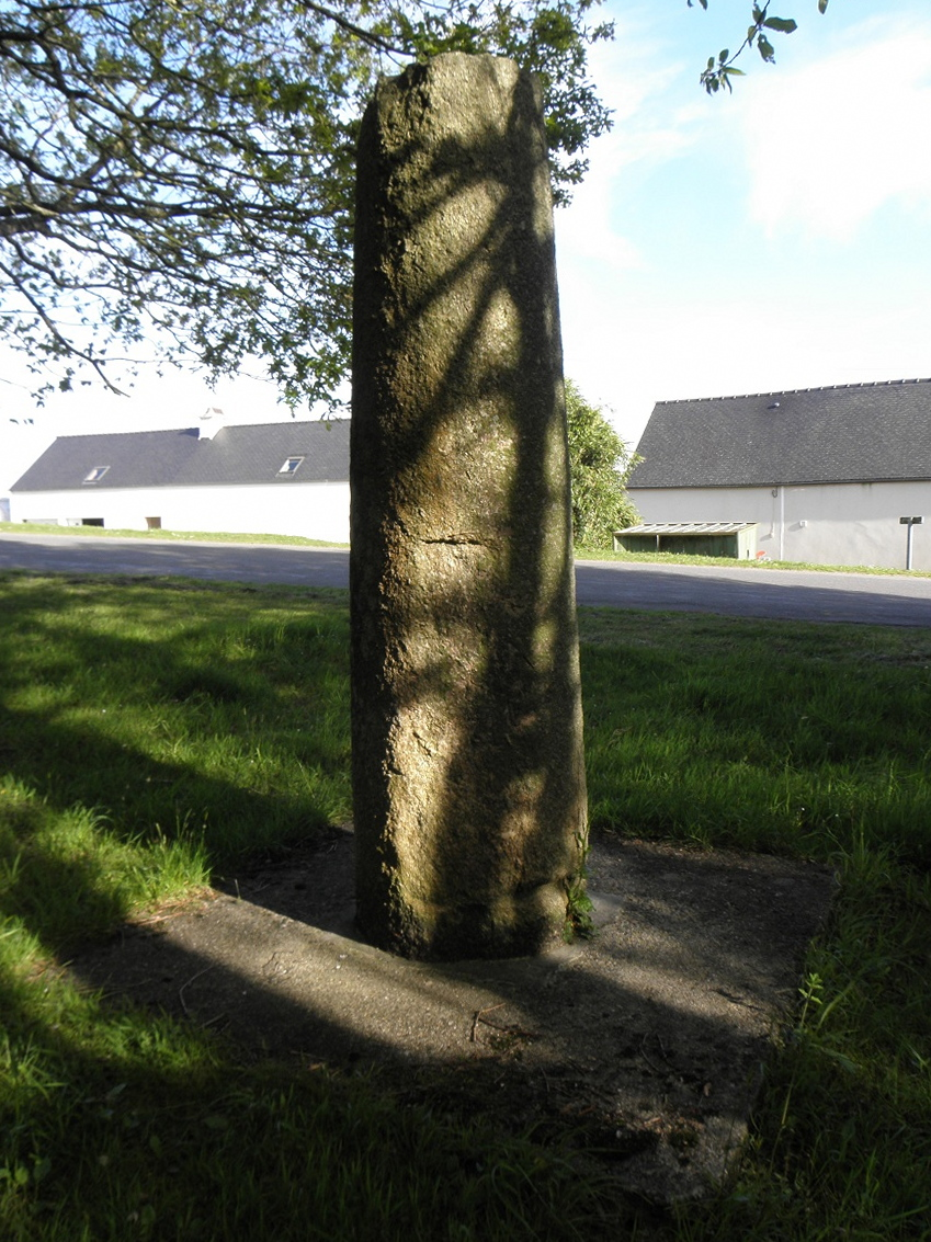 Borne milliaire de Quillidien, dite aussi Stèle de Croas ar Peulven, sise à Plouigneau (29).